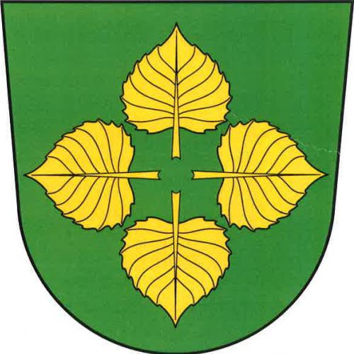 Znak obce Knyk